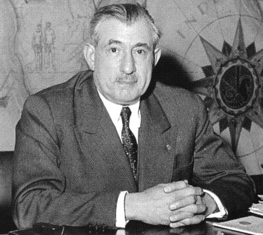 Max Hymans dans son bureau directorial d'Air France du 2 rue Marbeuf, à Paris.